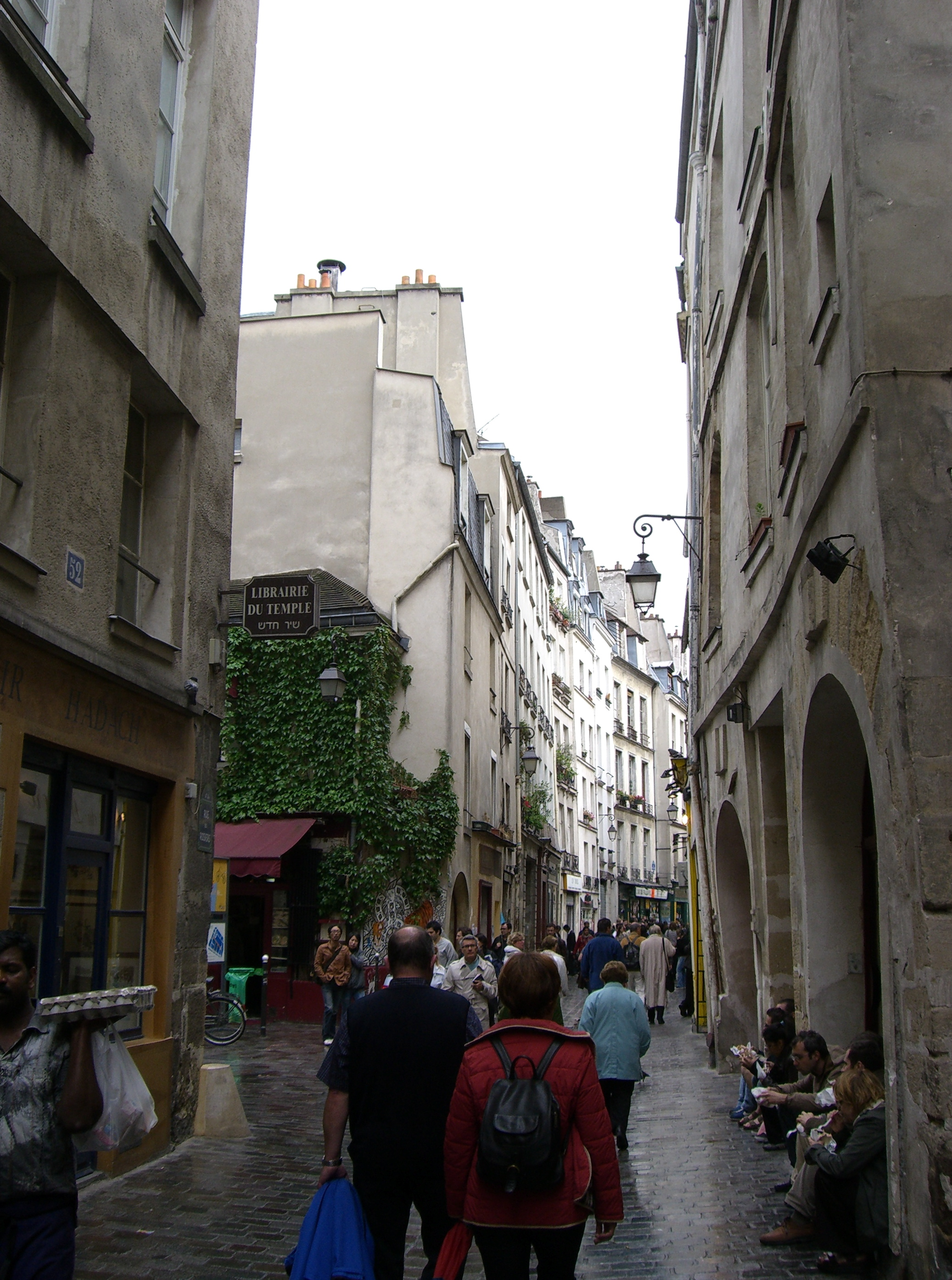 Paris, 3e arrondissement (France). Rue des Rosiers